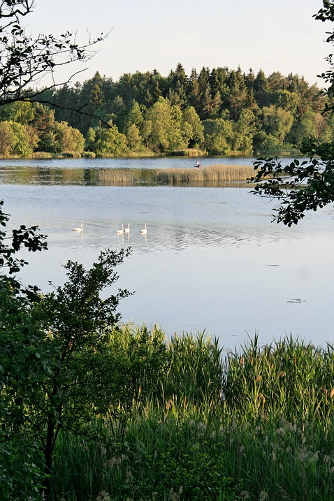 Gulbės pietvakarinio Veprių ežero kranto fone.